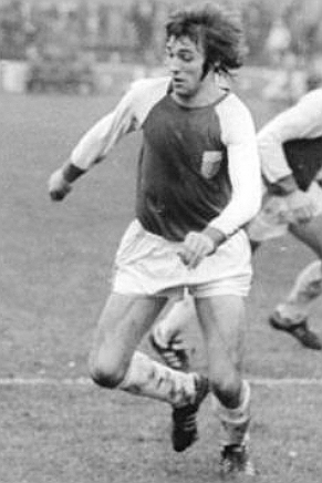 Title: Jena: Fußball-FDGB-Pokal - Viertelfinale FC Carl Zeiss Jena - 1. FC Lok Leipzig 3:1 Factual corrections and alternative descriptions are encouraged separately from the original description. Additionally errors can be reported at this page to inform the Bundesarchiv. Original historic description: ADN-ZB-Liebers-23.11.74-Jena: Fußball-FDGB-Pokal - Viertelfinale FC Carl Zeiss Jena - 1. FC Lok Leipzig 3:1 - Leipzigs Abwehr hatte über weite Strecken harte Arbeit zu leisten. Hier setzt sich Göhr, von Peter Ducke bedient, gegen Roth (l.) und Altmann (r.) vom 1. FC Lok Leipzig durch.